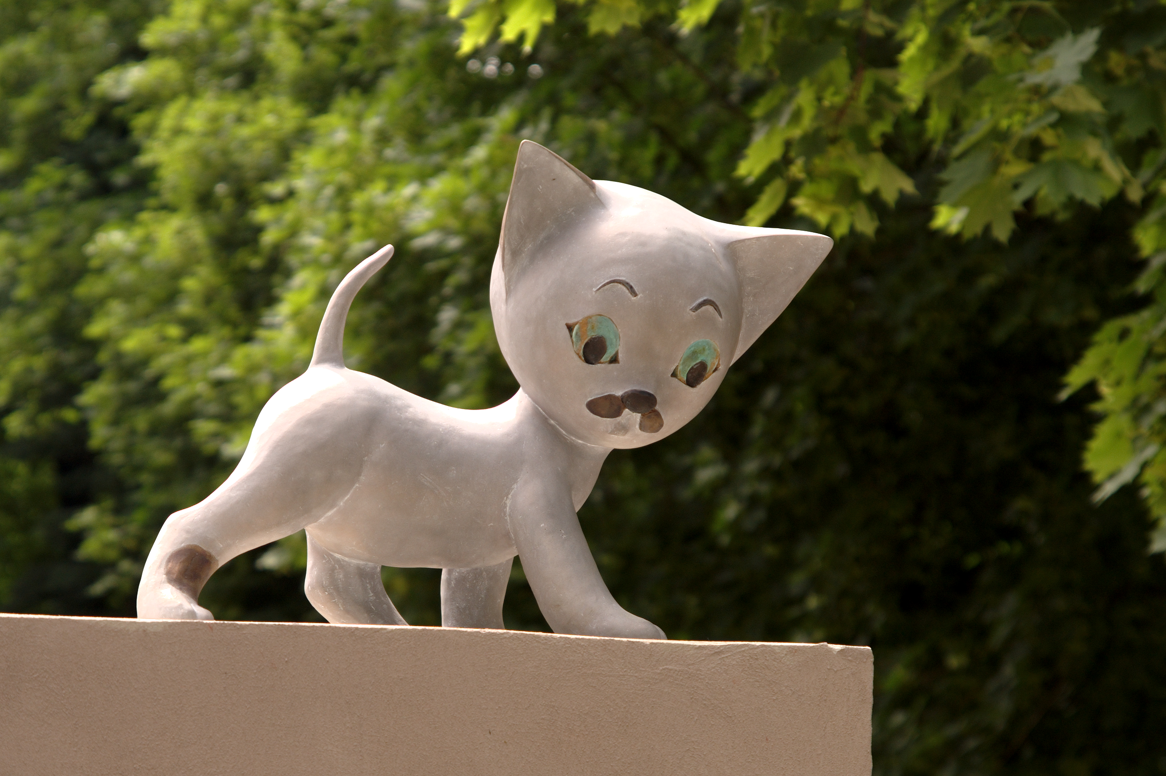 Kot Filemon, rzeźba autorstwa Magdaleny Walczak i Marcina Mielczarka, Bajkowa Łódź, Muzeum Kinematografii, Łódź